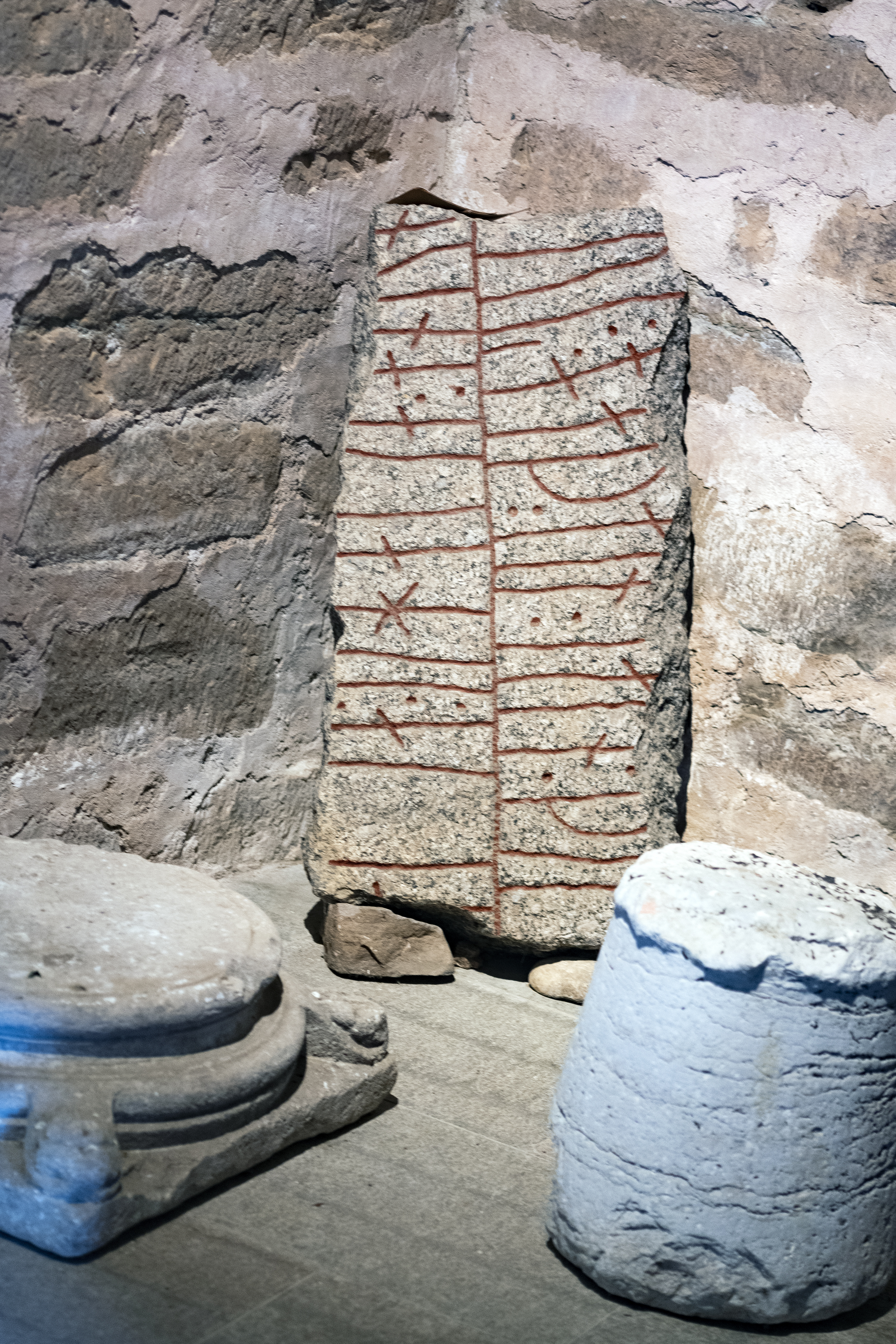 Ög118